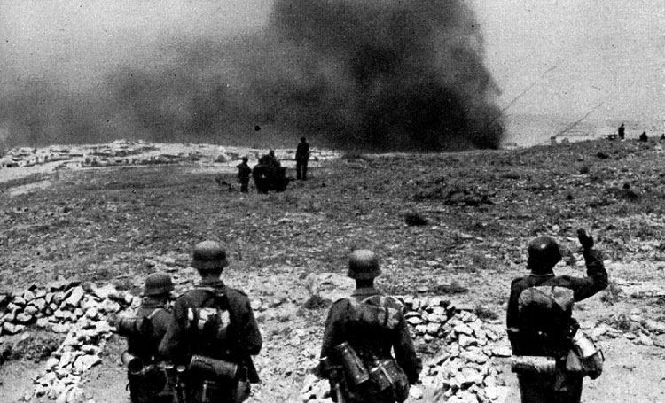 Le truppe tedesche della 11. Armee si avvicinano a Sebastopoli in fiamme nel giugno 1942